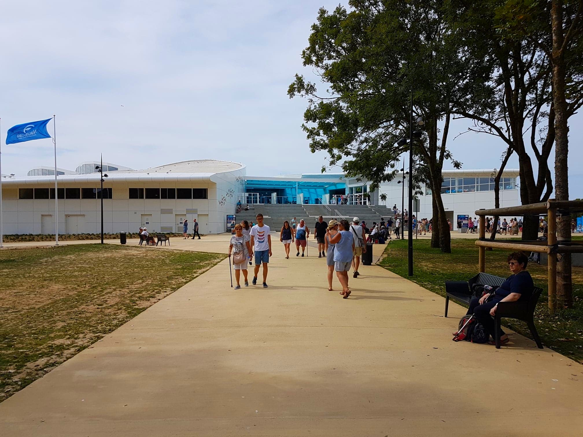 Centre national de la mer Nausicaá à Boulogne-sur-Mer (Pas-de-Calais, France)